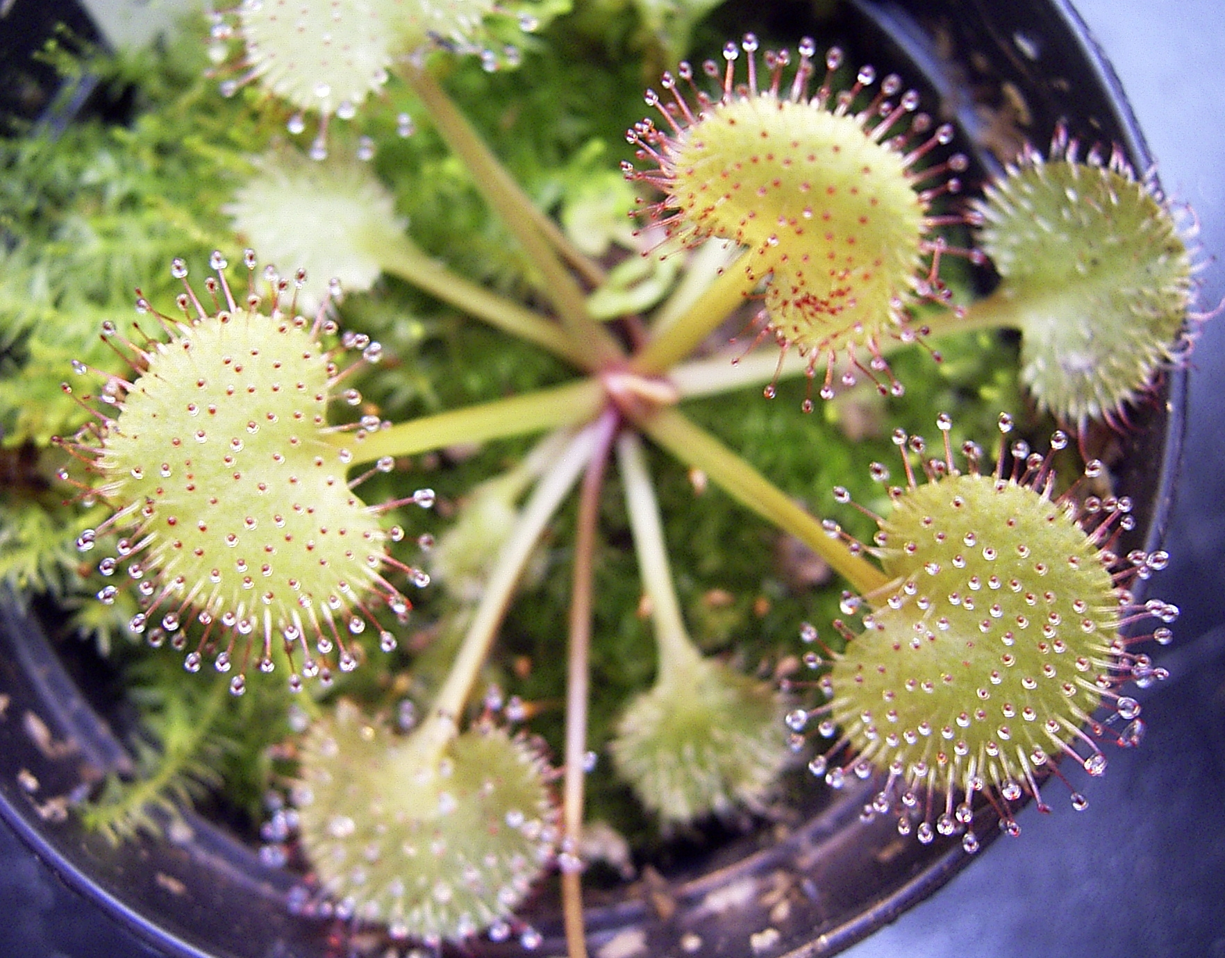 Drosera prolifera habitus